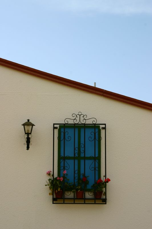 Ganbara bateko leihoa burdinsarearekin.